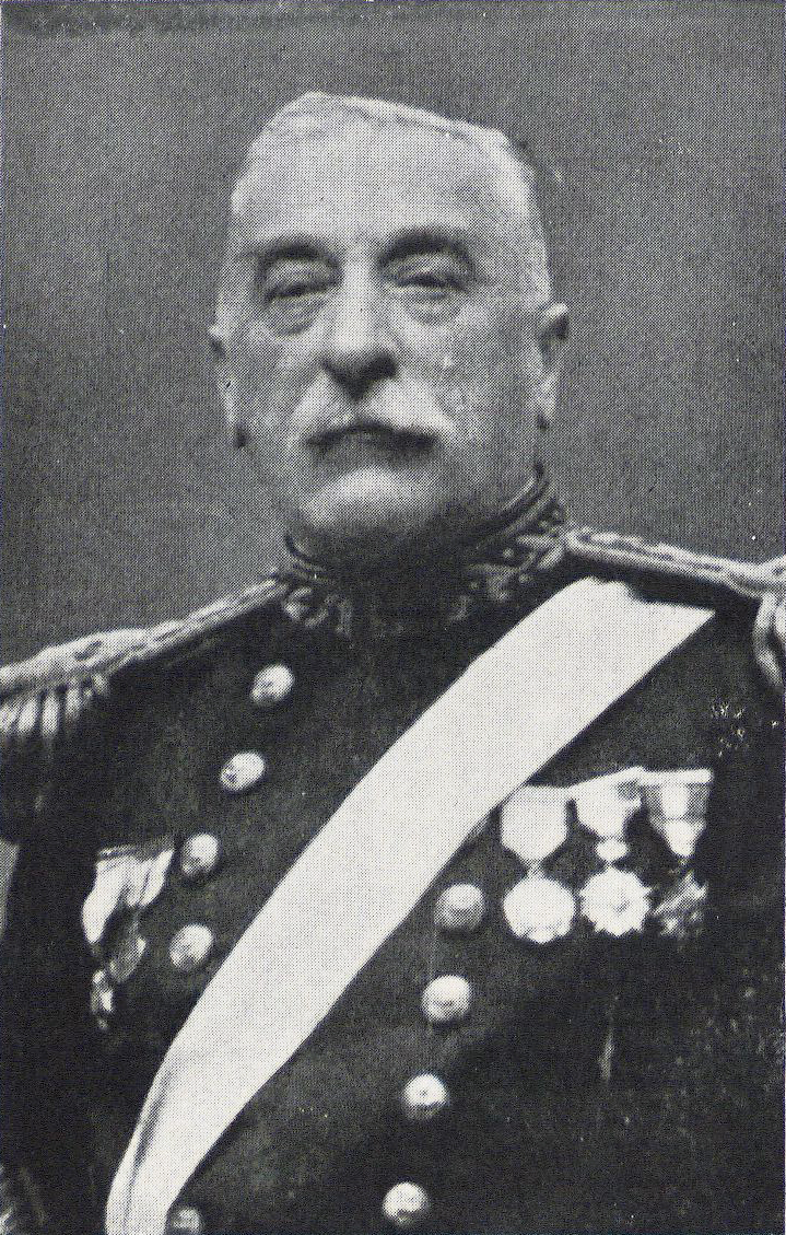 Arturo Fernández Vial (Santiago, 15 de marzo de 1858 - † Santiago, noviembre de 1931) Marino Chileno. Guardiamarina de la corbeta Esmeralda en el Combate naval de Iquique del 21 de mayo de 1879. Participó en la Guerra del Pacífico y en la Guerra Civil de 1891.